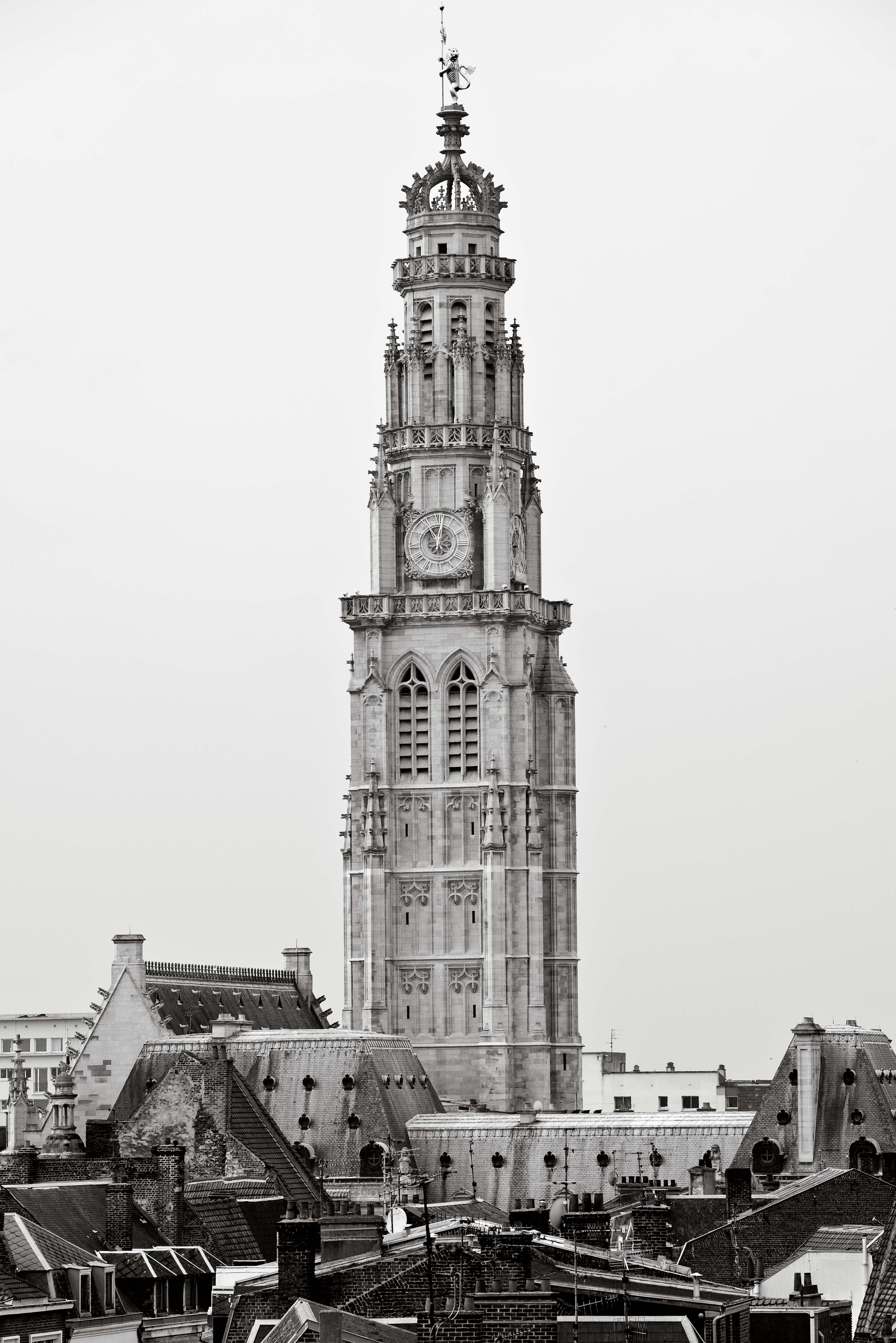 Beffrois de Arras.